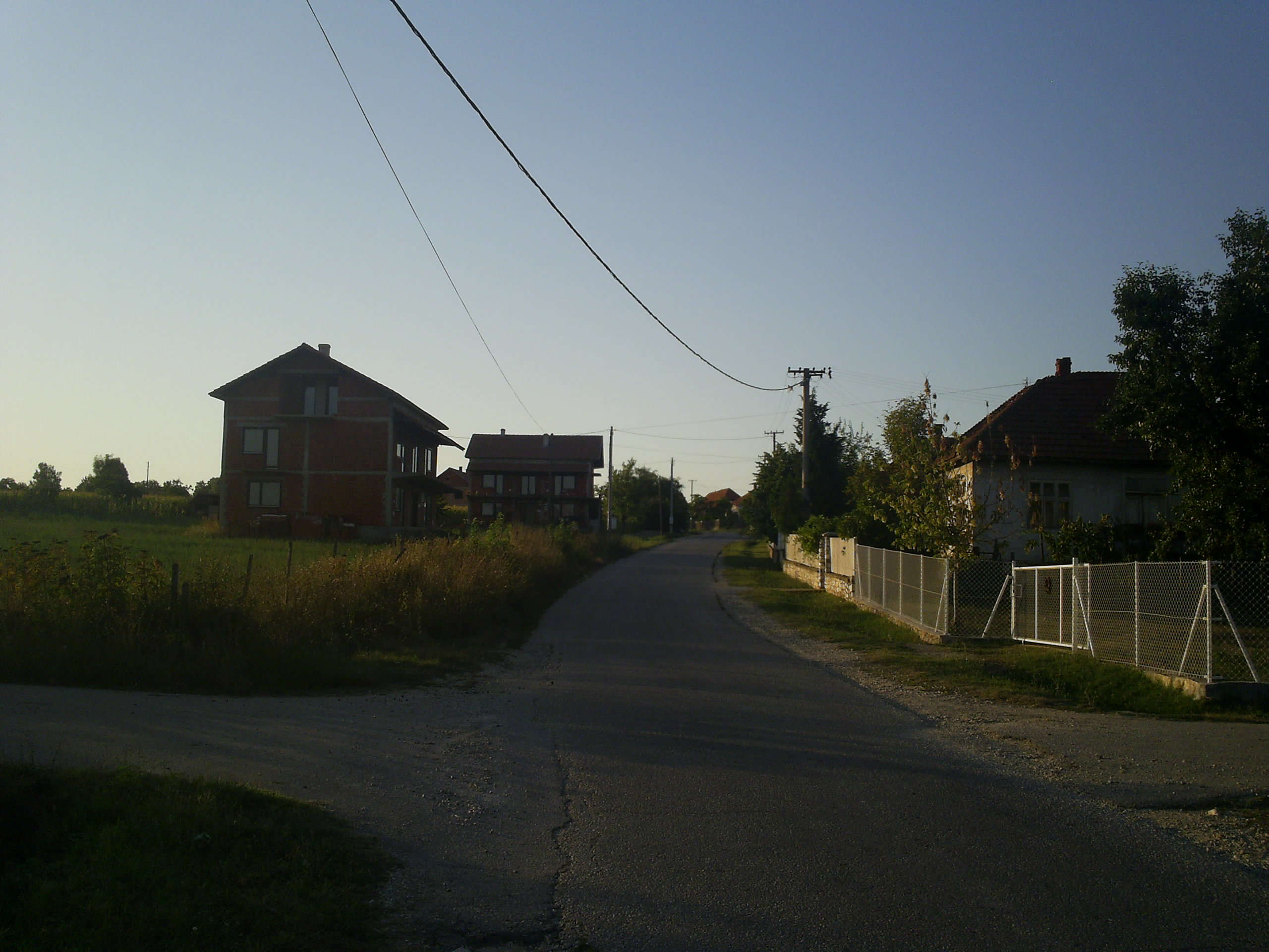 Црни Као (Баточина).